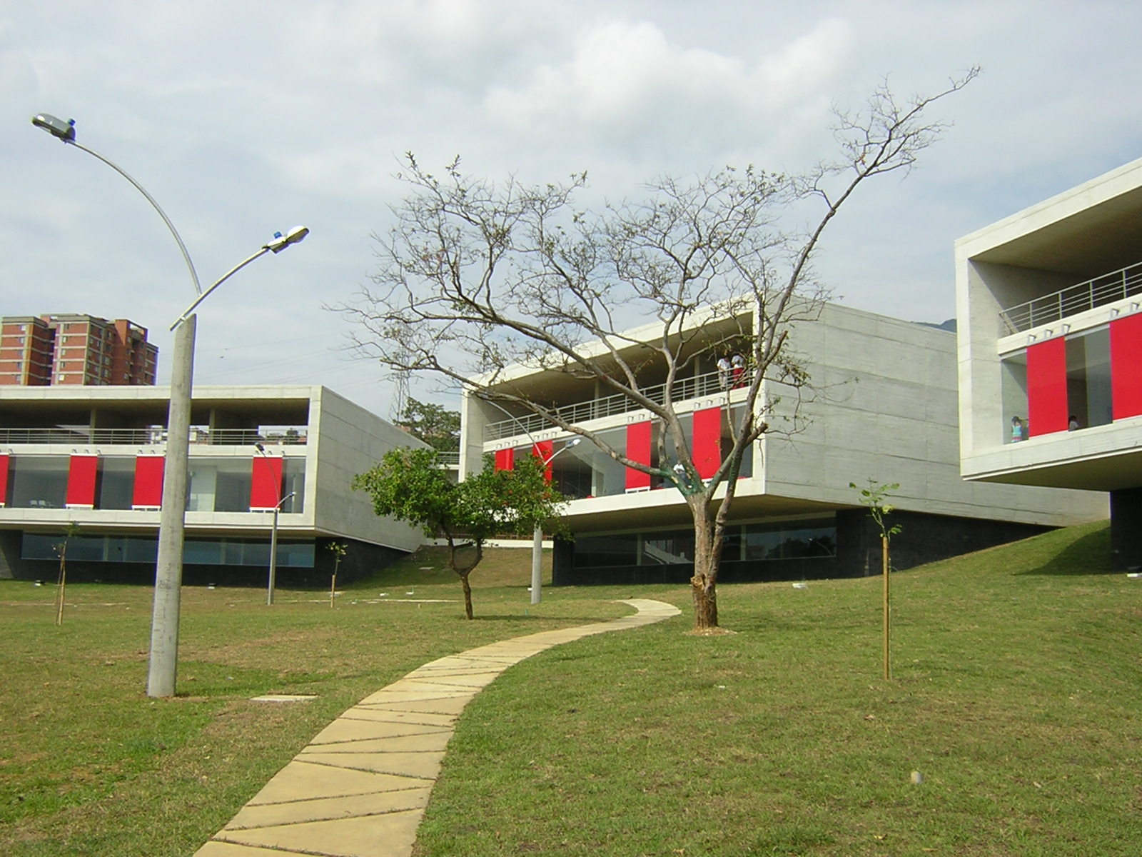 Biblioteca León de Greiff, Medellín, Colombia